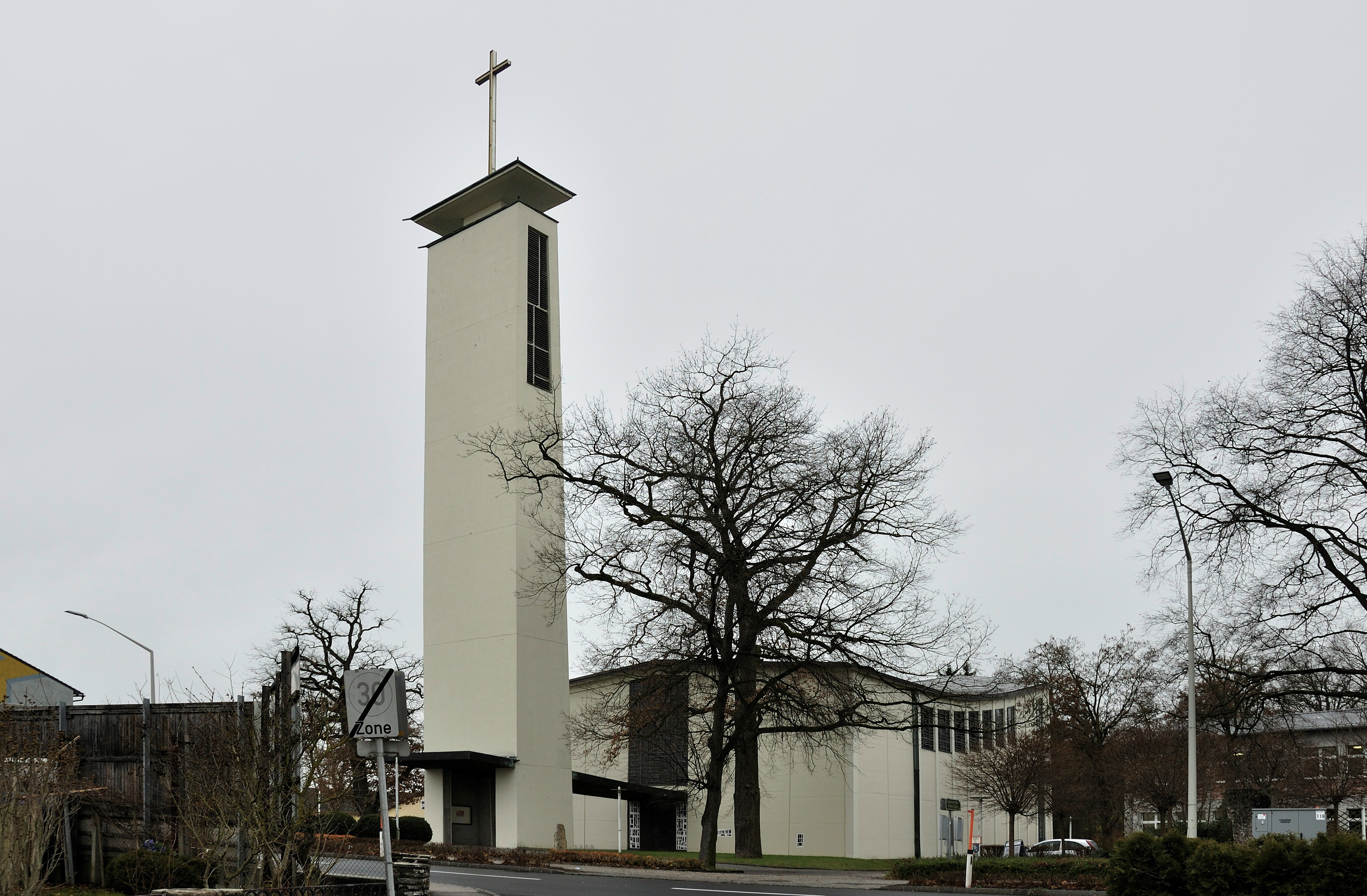 Kath. Pfarrkirche Bruder Klaus